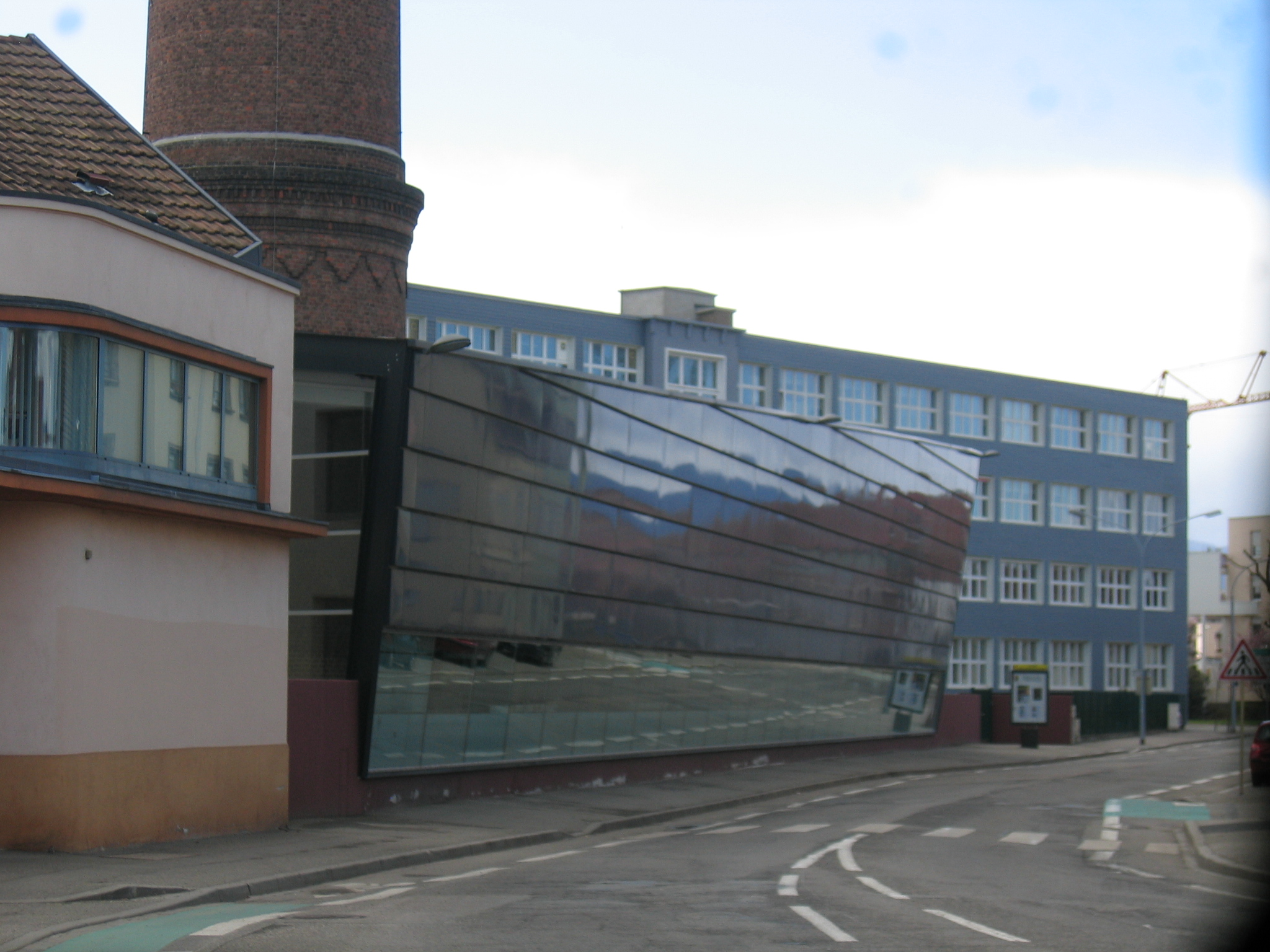 L'IUT de Colmar : campus du Grillenbreit avec sa bibliothèque universitaire au premier plan